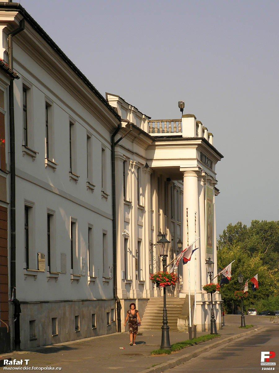 Gmach dawnego kolegium Pijarów - widok w kierunku ul.Żytniej.